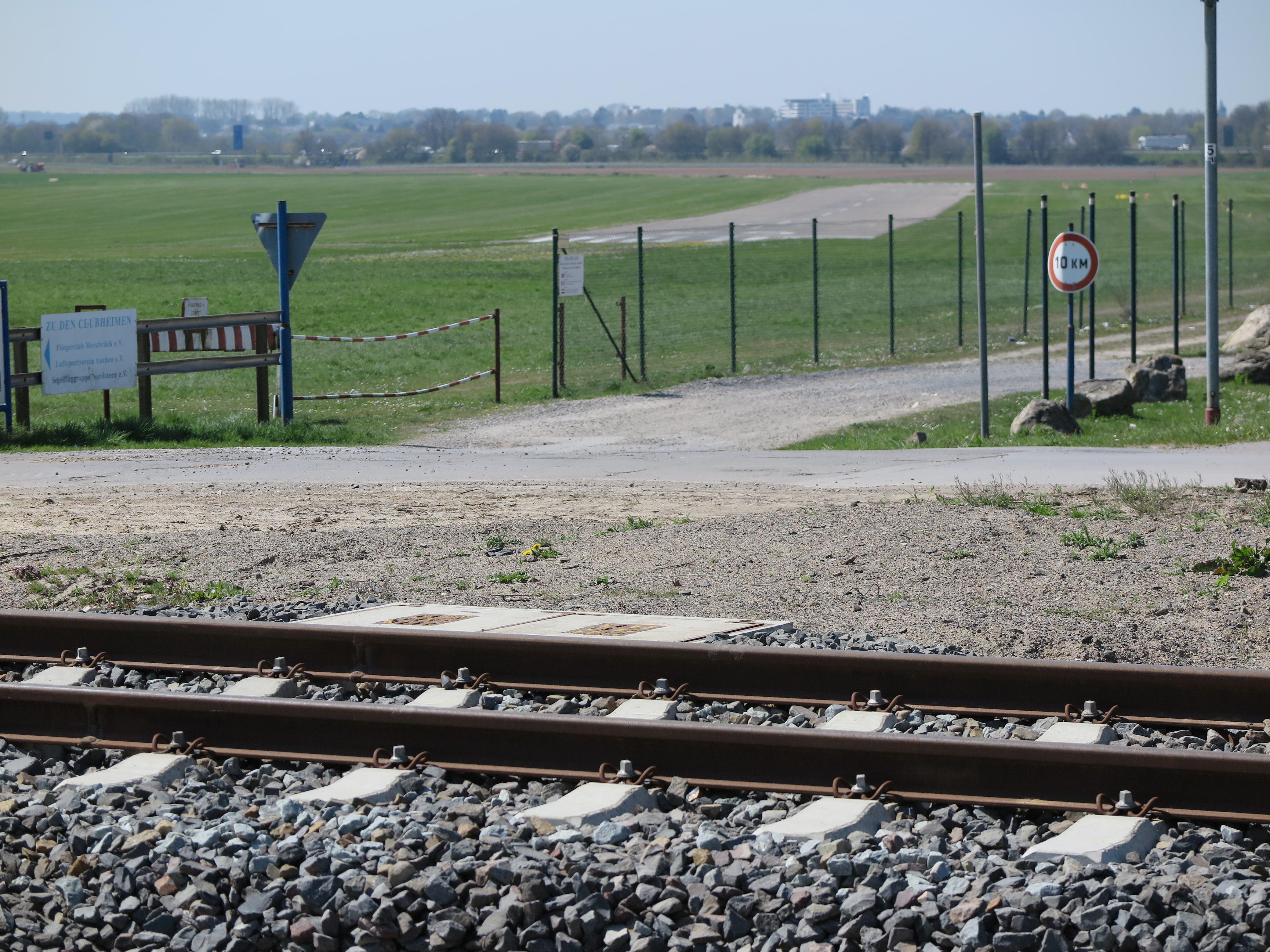 Bahnstrecke Stolberg–Herzogenrath im Bereich des Flugplatzes Merzbrück. Die geplante Elektrifizierung der Bahnstrecke ist hier nicht genehmigungsfähig, da die Oberleitung in der Einflugschneise des Flugplatzes hängen würde. Im Hintergrund ist die 520m lange und 20m breite Start- und Landebahn 08/26 zu sehen.